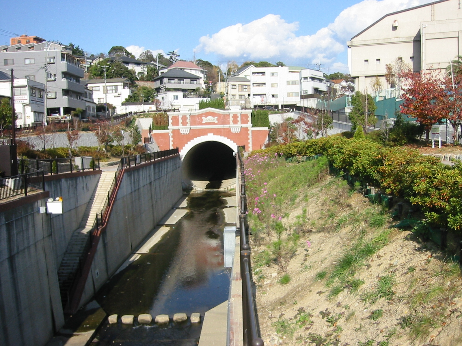 神戸 新湊川トンネル。日本最初(1901年)の近代河川トンネルの旧会下山トンネル(湊川隧道)だったところ